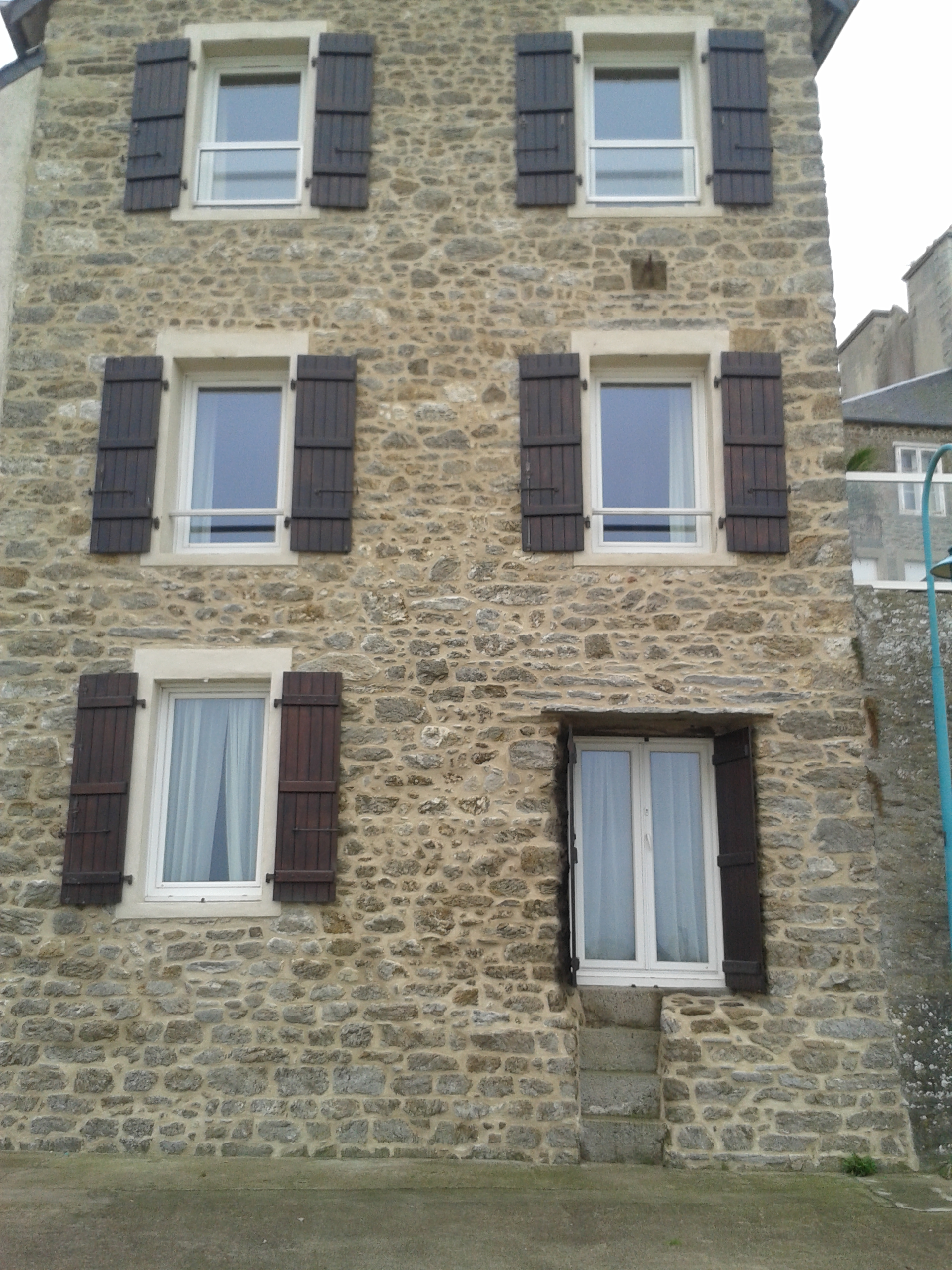 Une maison à Saint-Servan, le long de la promenade de la plage des Bas-Sablons. La particularité : la porte est située en hauteur, il faut monter les marches pour y accéder.